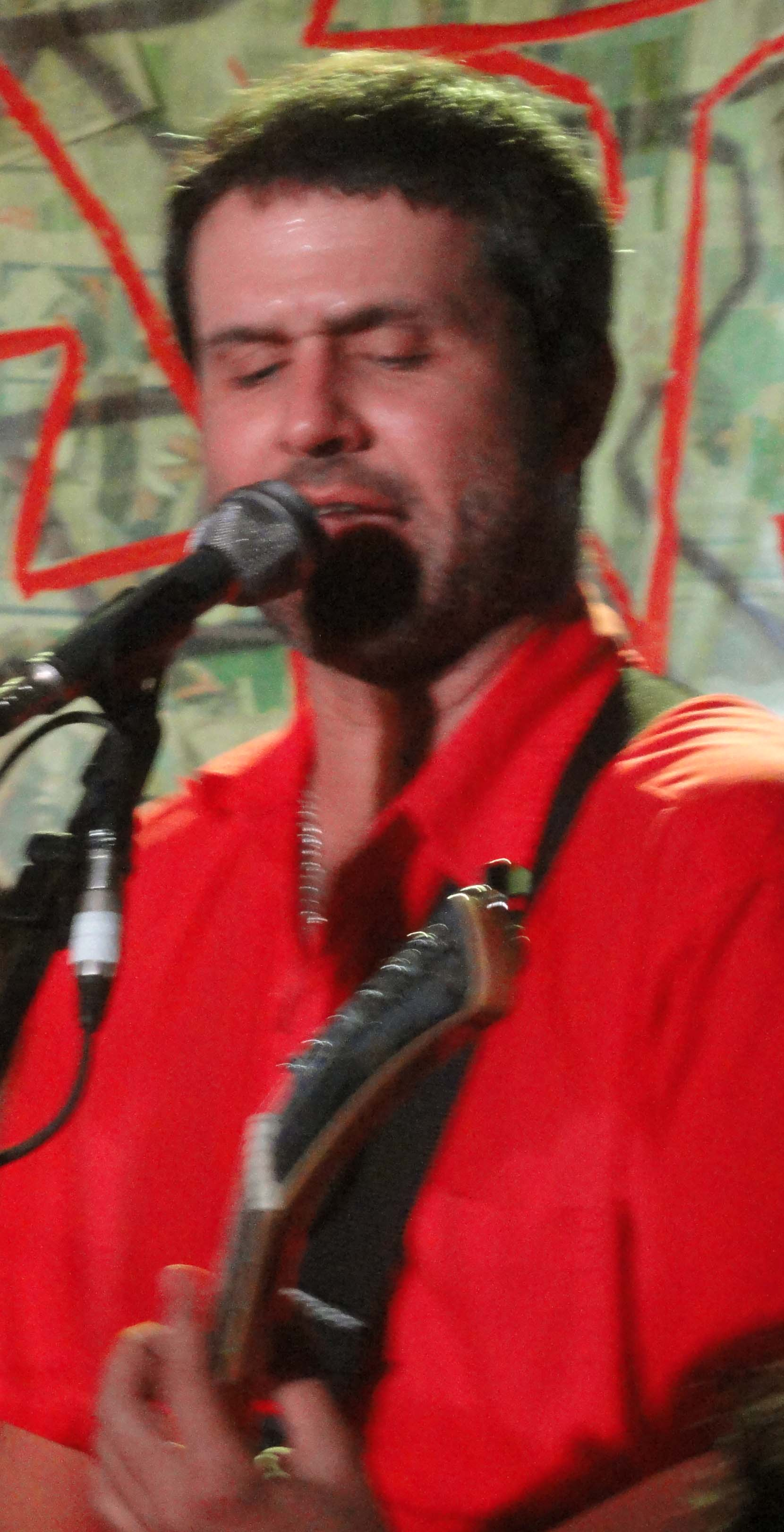 Graforréia Xilarmônica no bar Ocidente - Carlo Pianta